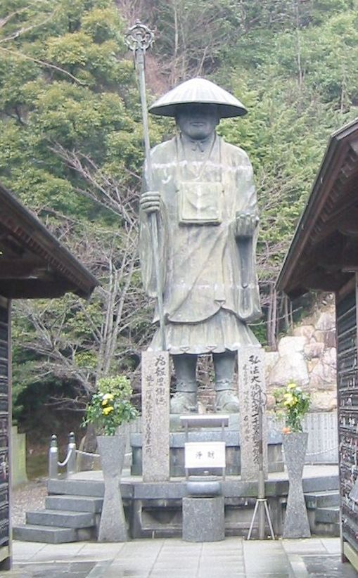 空海 八十八番札所 大窪寺